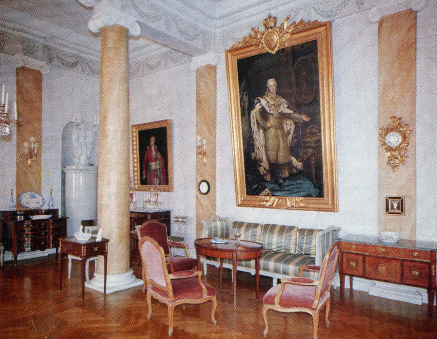 Elghammar slott stora galleriet